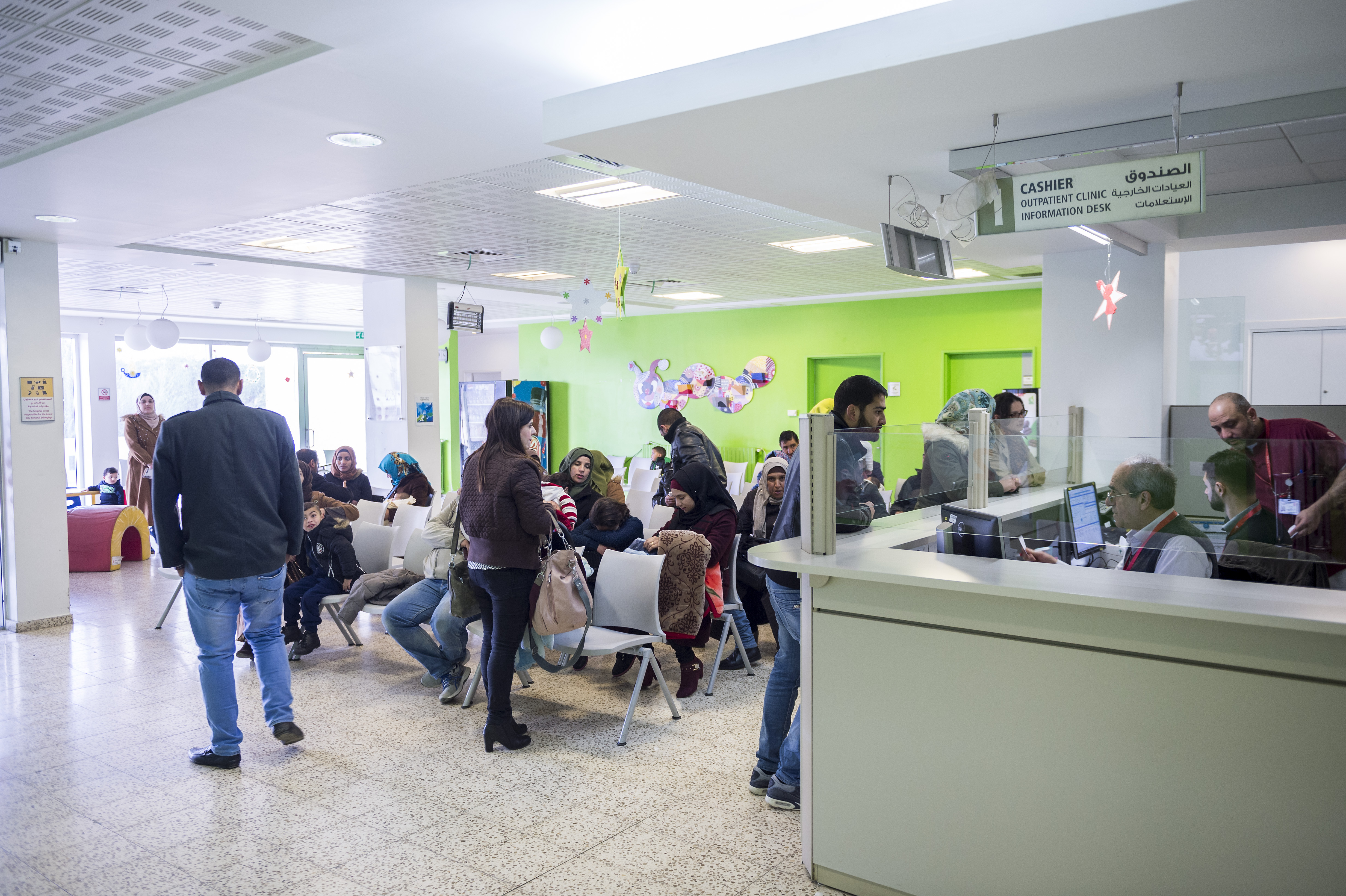 Out-Patient Clinic im Caritas Baby Hospital